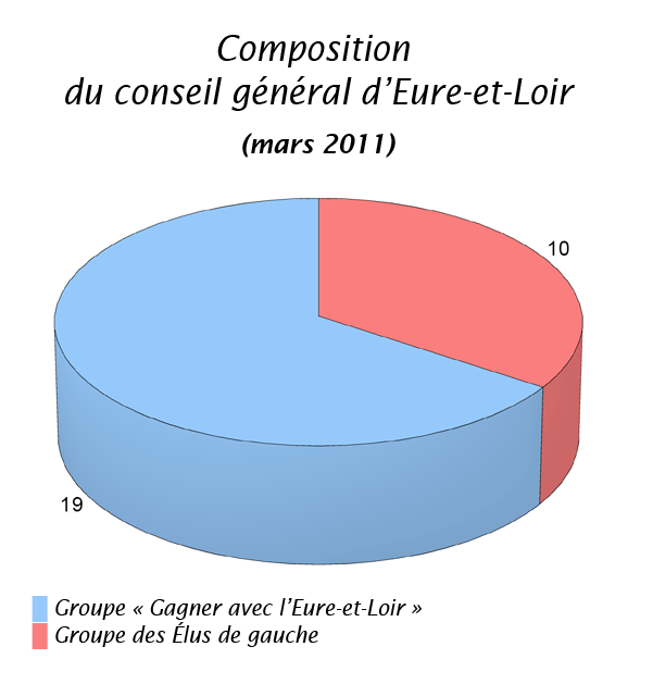 Composition du conseil général d'Eure-et-Loir (janvier 2011)